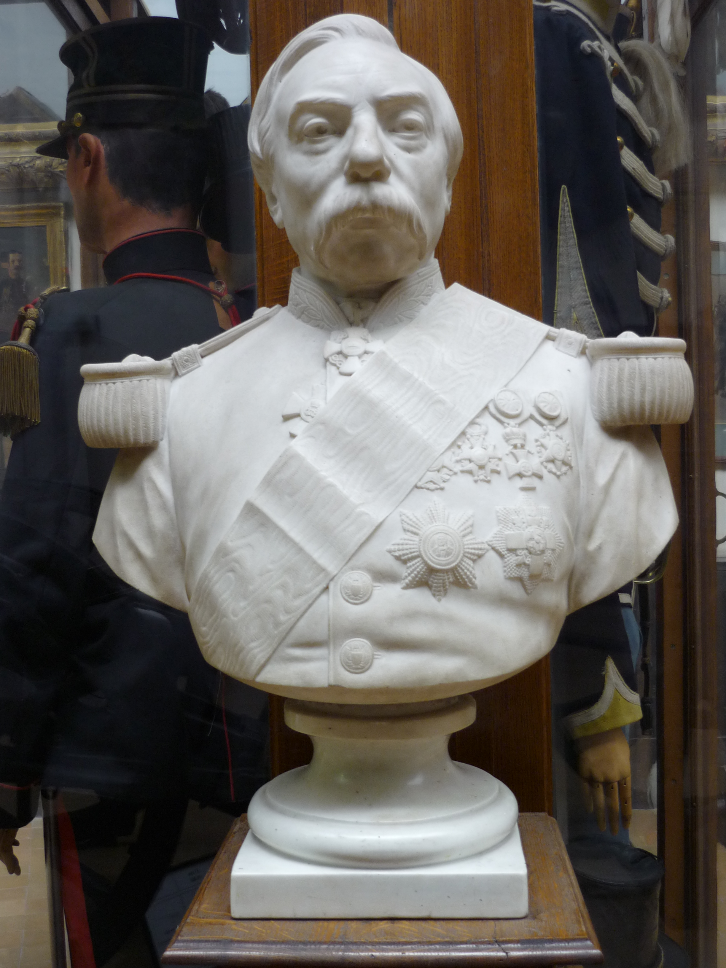 Buste de Guillaume Gratry, musée du Cinquantenaire, Bruxelles, Belgique. Royal Museums of Art and History Native nameMusées royaux d’art et d’histoireLocationBrusselsCoordinates50° 50′ 25.85″ N, 4° 23′ 35.37″ E Established1835Web page control : Q945059 VIAF: 147671754 ISNI: 0000 0001 2342 957X GND: 1006854-5 SUDOC: 162391722 institution QS:P195,Q945059